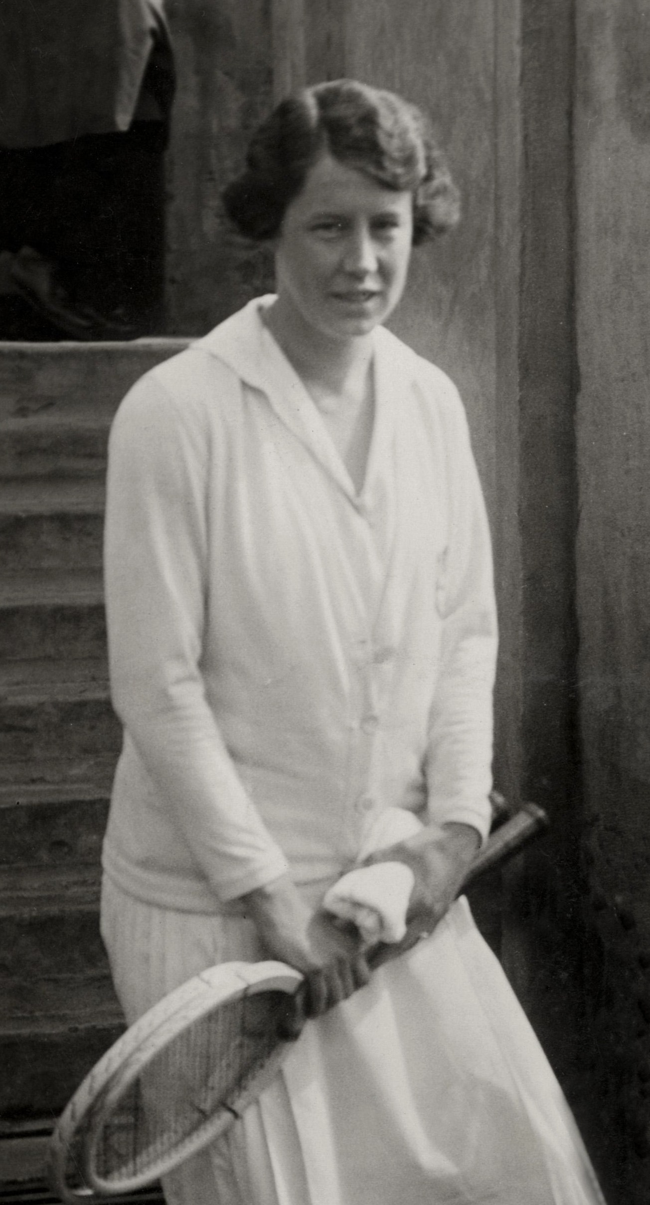 Sport, tennis. Tennissters M.J. (Mence) Canters op het tennistoernooi Nederland-USA. Nederland, Scheveningen, 1928.